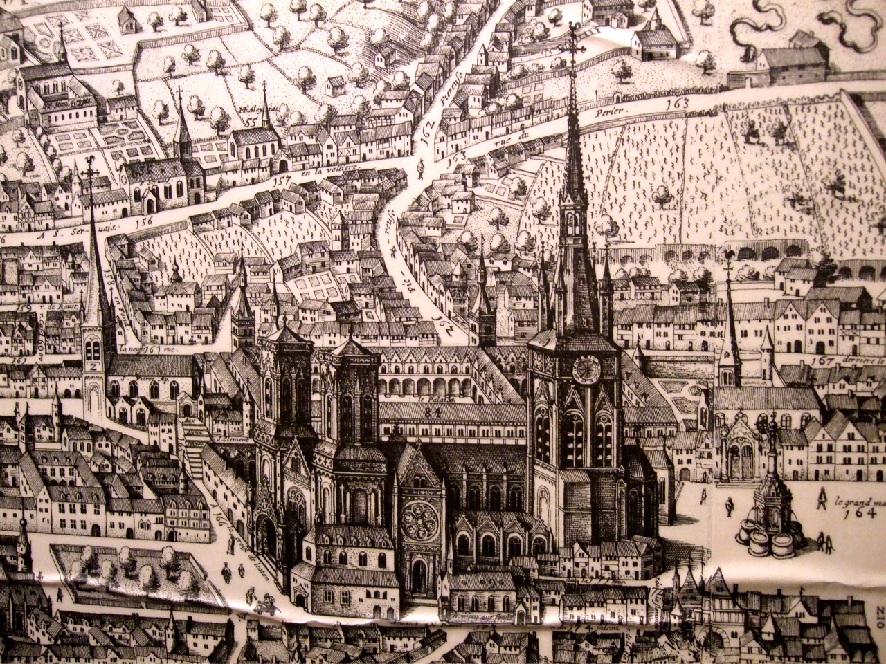 Blaeu extrait: Saint Lambert, Saint Pierre, Notre Dame au Fonts de Liège